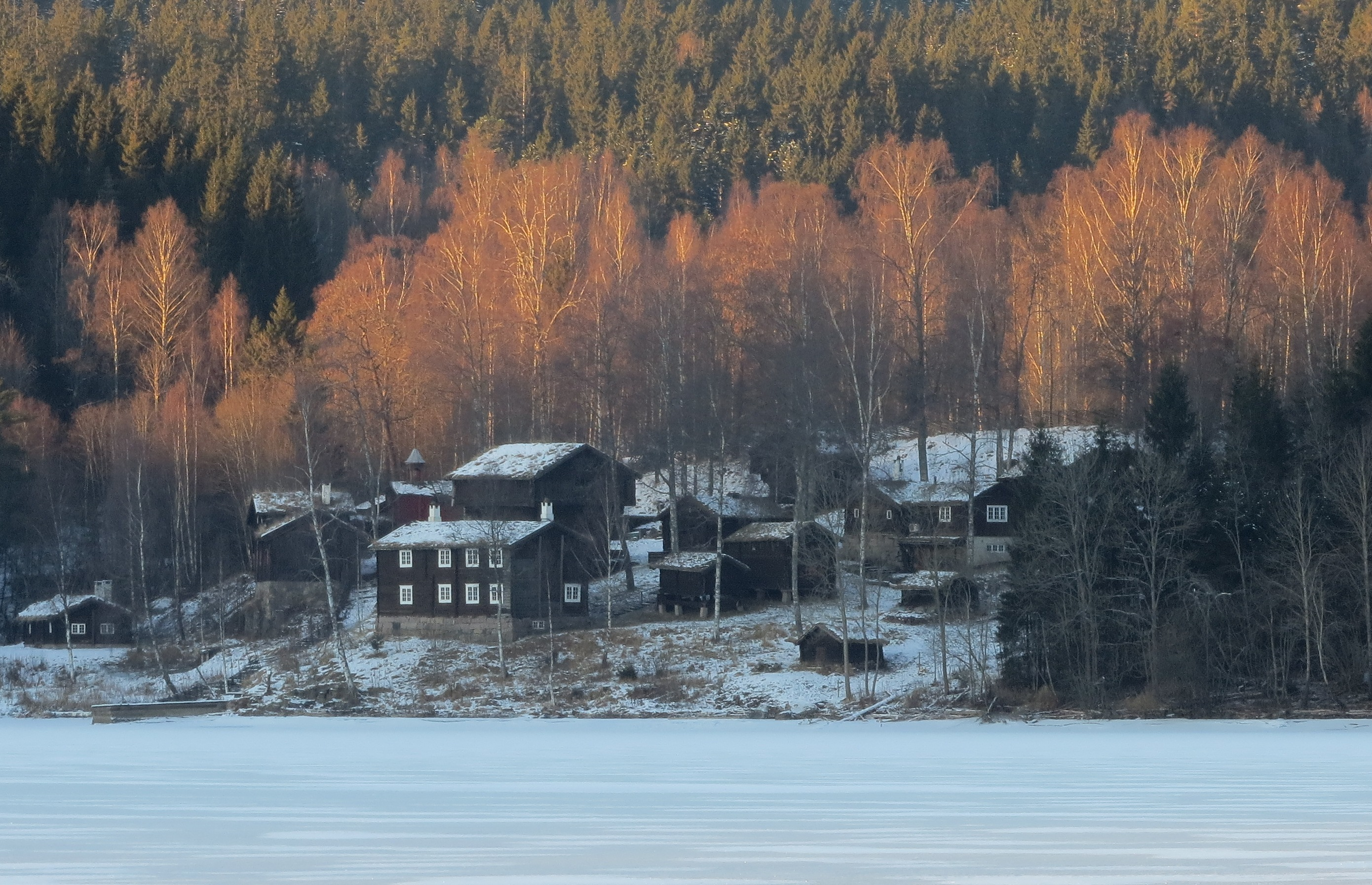 Gårdsanlegg med bakgrunn i middelalderen, på nordbredden av Bogstadvannet - Sørkedalen, Oslo